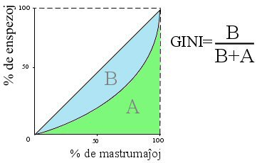 Koeficiento de Gini